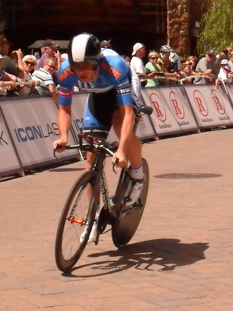 Le coureur cycliste américain Scott Zwizanski en 2011